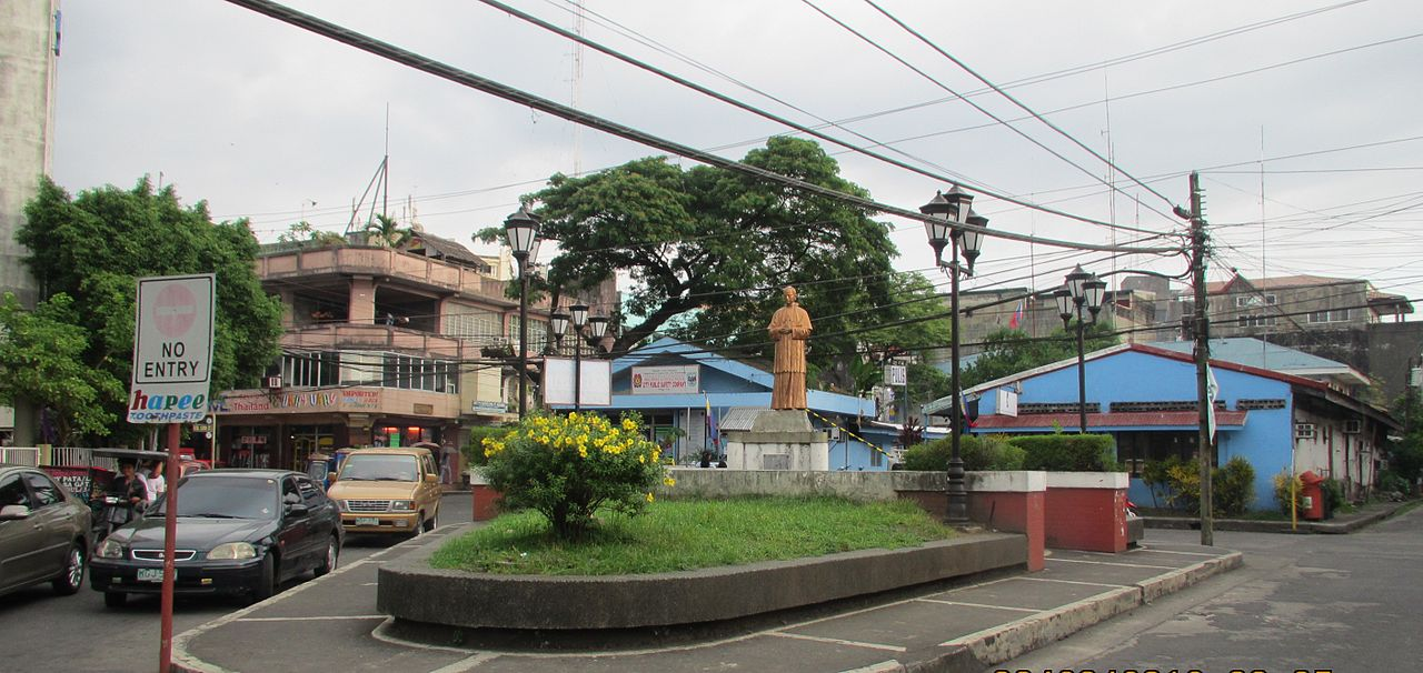 Bikol Central: Lumang Barlin Plasa